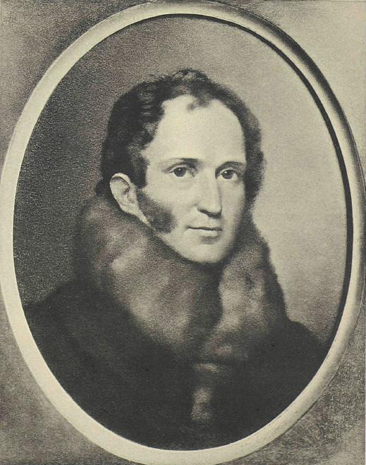 Князь Г.И.Гагарин (1782-1837)